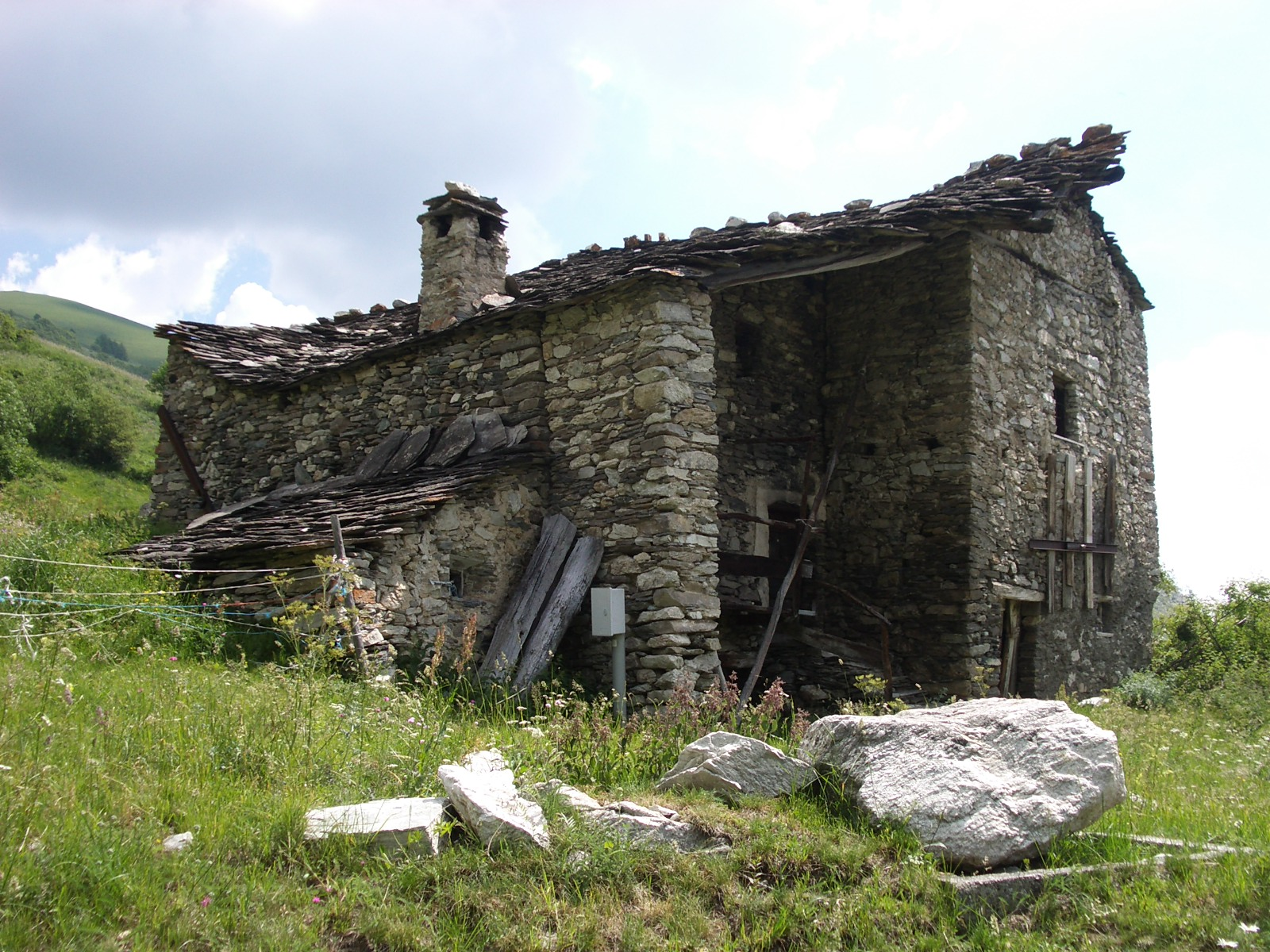 Ussolo, Prazzo, Maira Valley, Italy